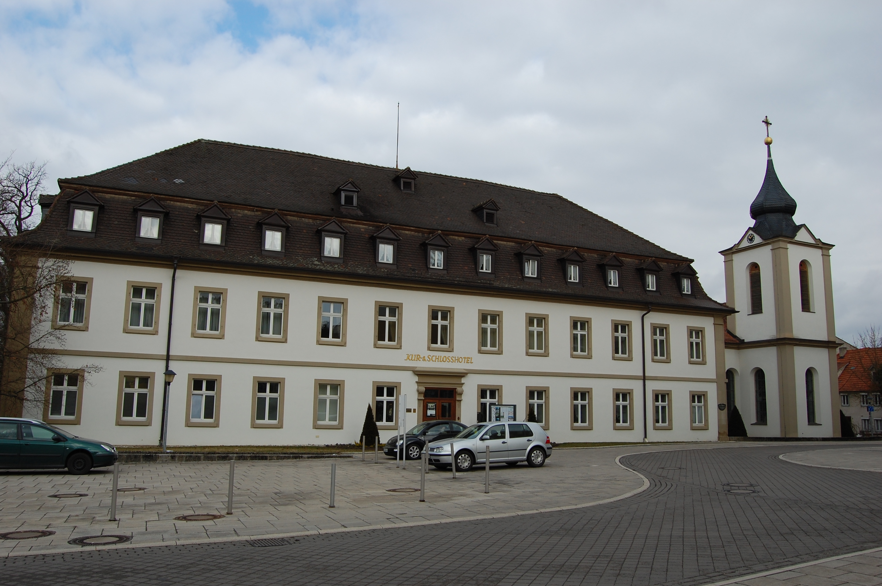 Bad Neuhaus, Ortsteil von Neustadt an der Saale, ehemaliges Schloss und Schlosskapelle (2011). Im Jahre 1451 wurde das "Neue Haus" (daher der Name "Neuhaus") erbaut. Das Schloss wurde 1767 durch Egid von Borie neu aufgebaut. Das Gebäude ist seit 1888 Kurgebäude, das im Jahre 2006 renoviert wurde. Die Schlosskirche (rechts im Bild) erbaute man in den Jahren 1773 bis 1776 nach den Plänen von Heinrich Todesko. Im Jahre 2004 wurde das Gebäude renoviert.